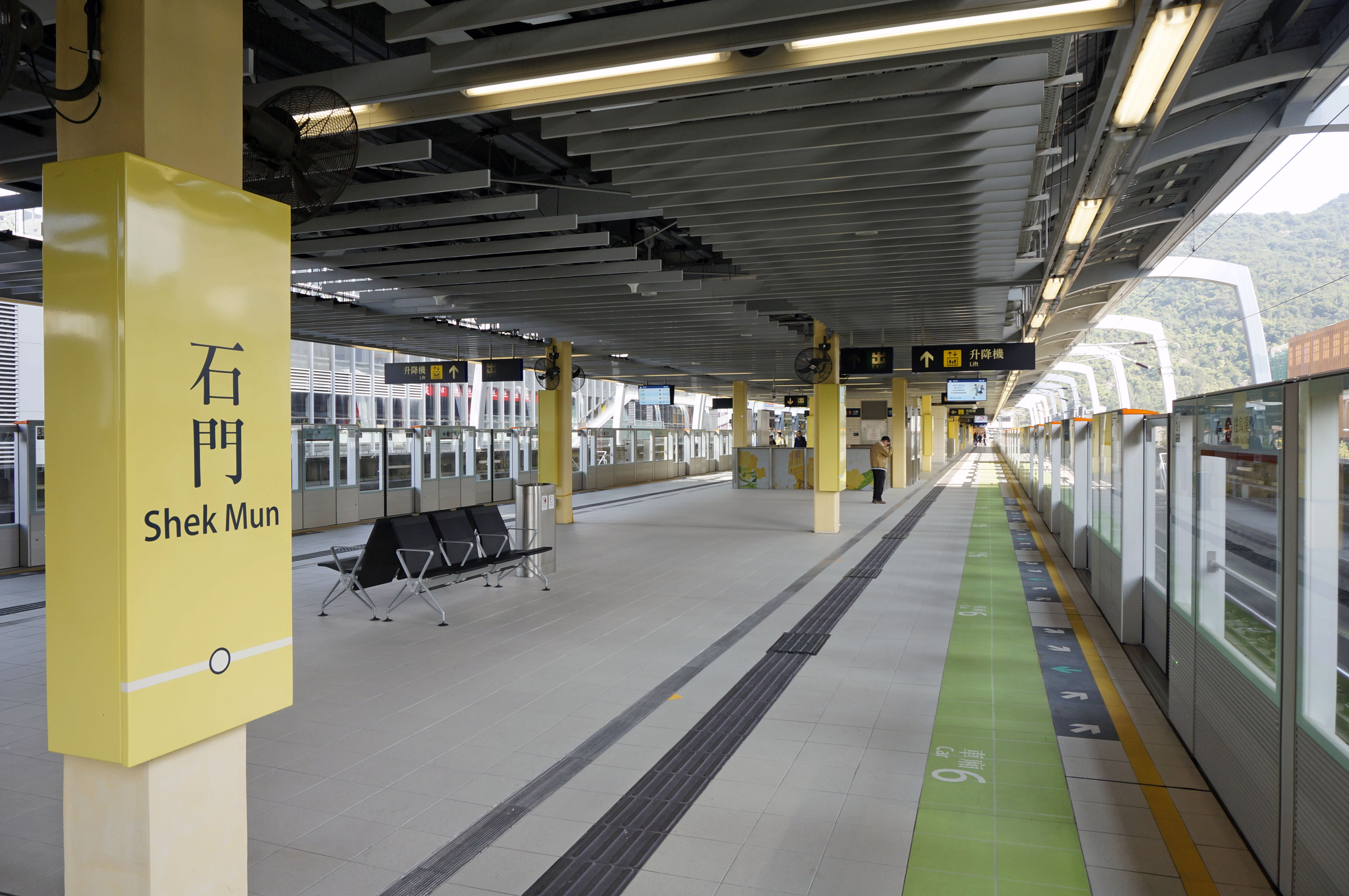 港鐵石門站月台